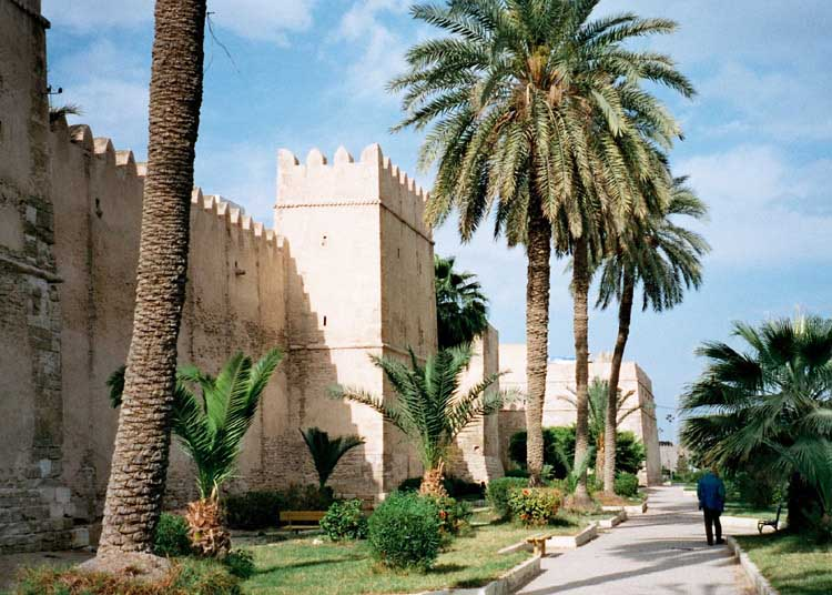 Murs de la médina de Sfax Photo de Stuart Edwards (2002)